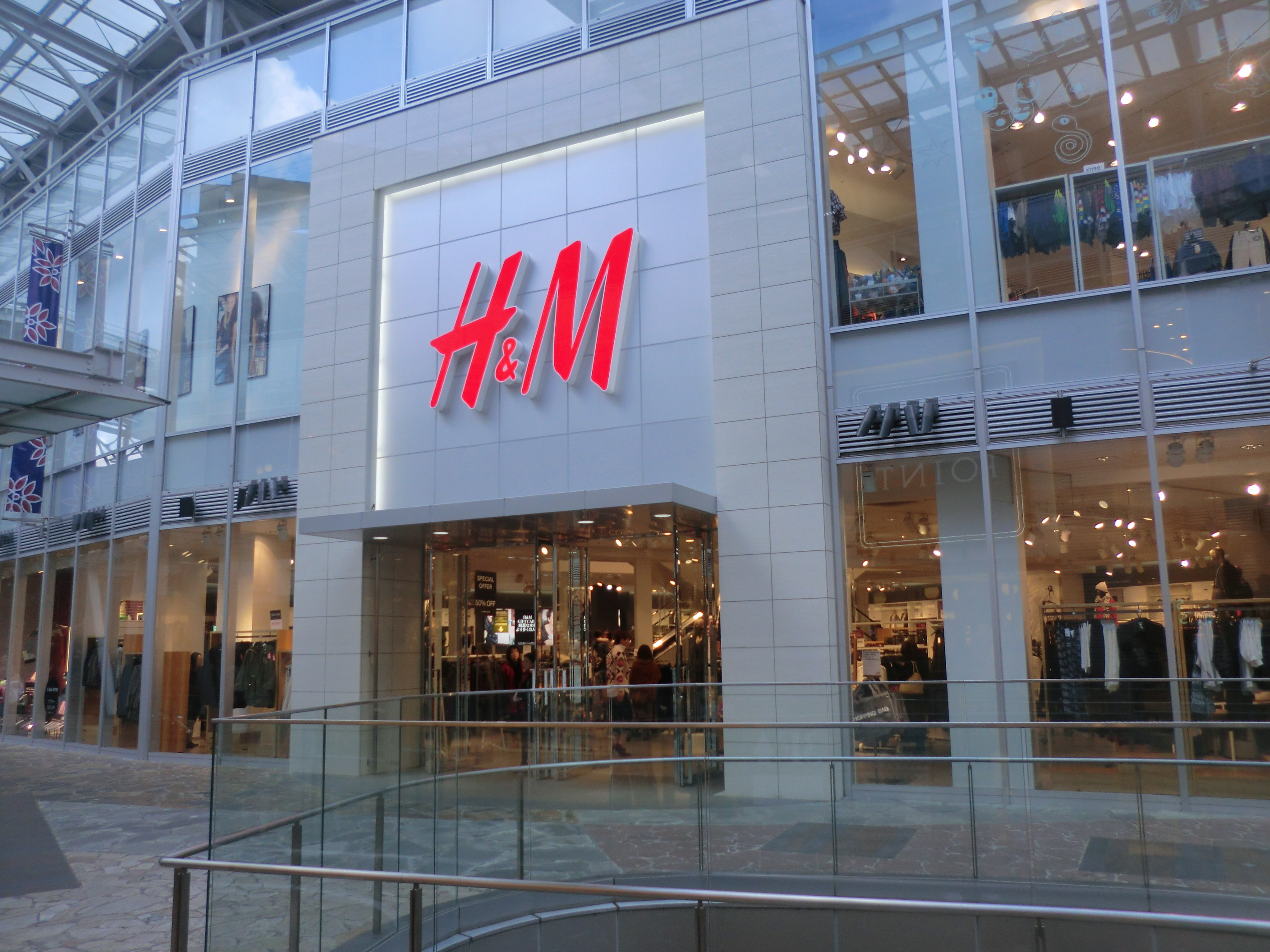 キャナルシティ博多イーストビルにあるH&Mのキャナルシティ博多店です。